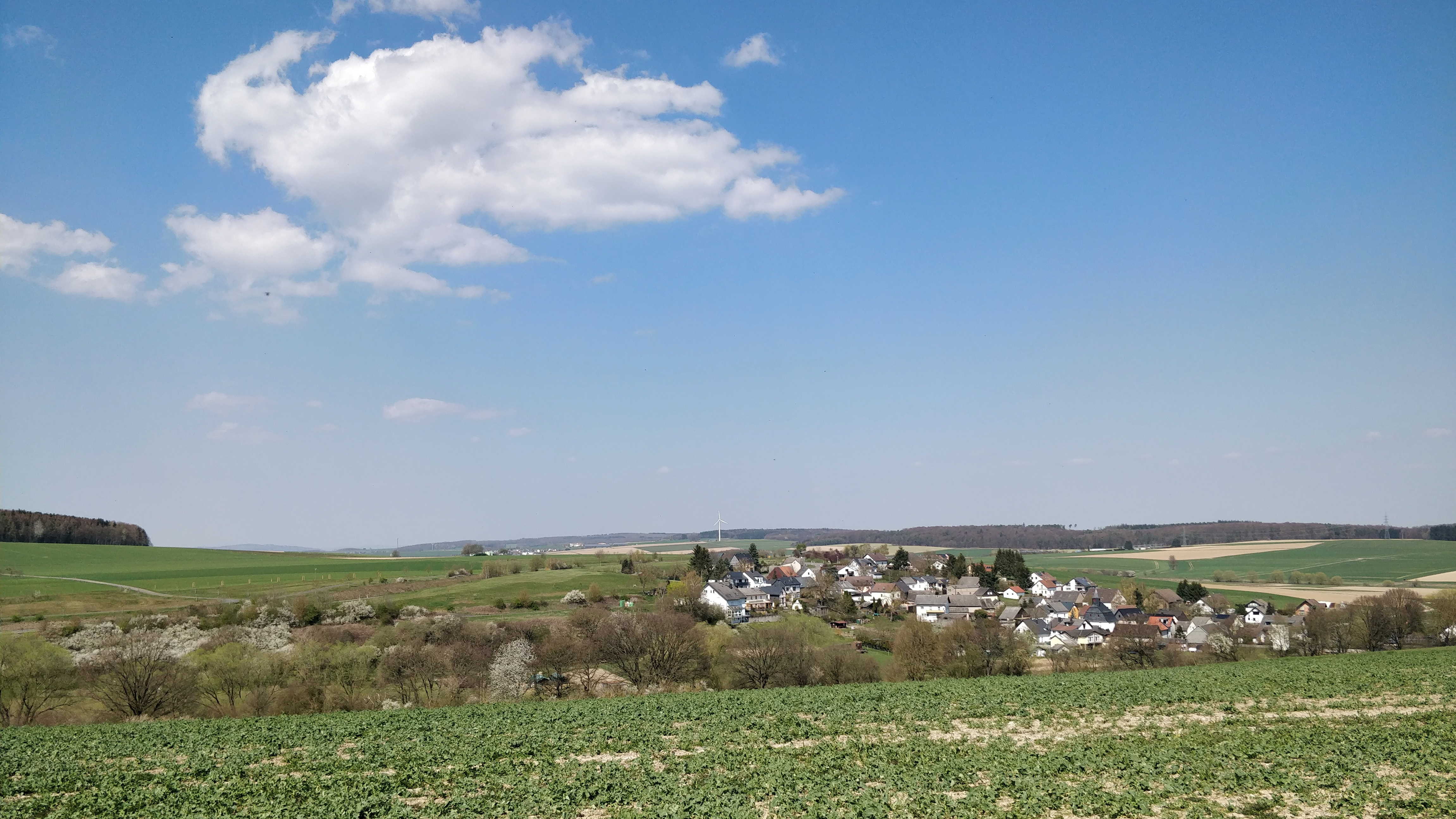 Blick von Süden über Reckenroth das Dörsbachtal hinab